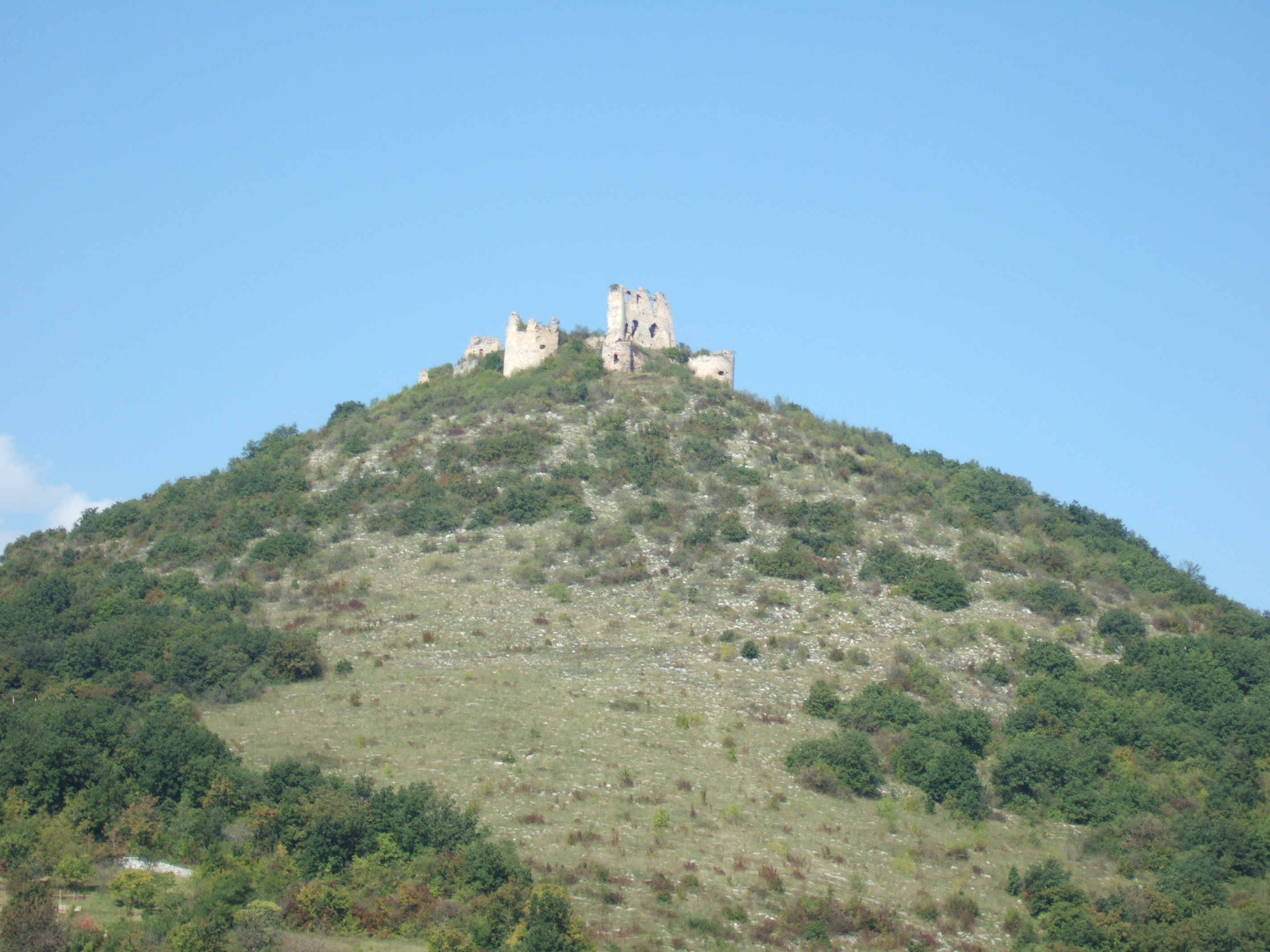 Turňa Castle, Slovakia